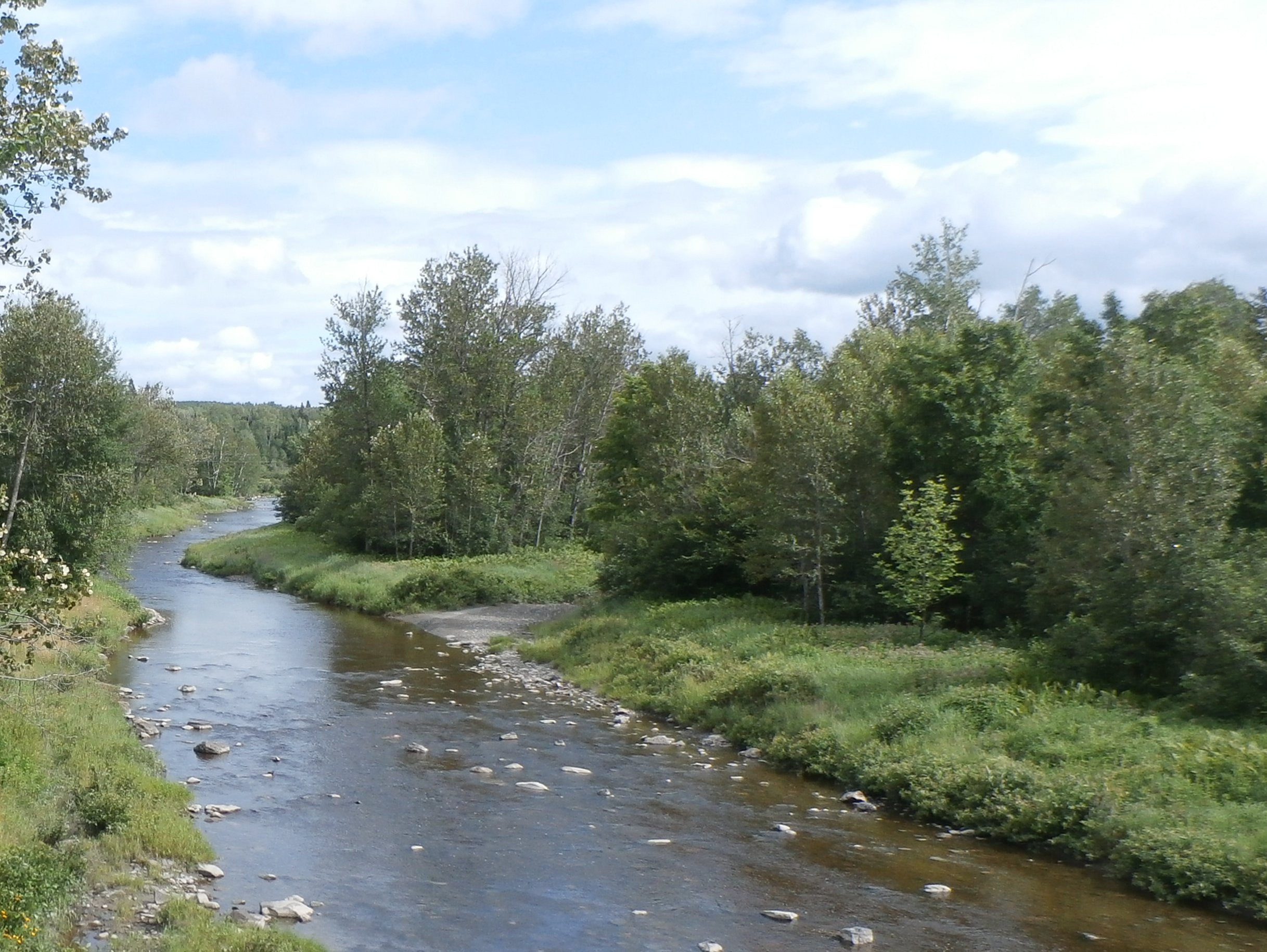 Rivière Samson vue vers le sud de la route 204.